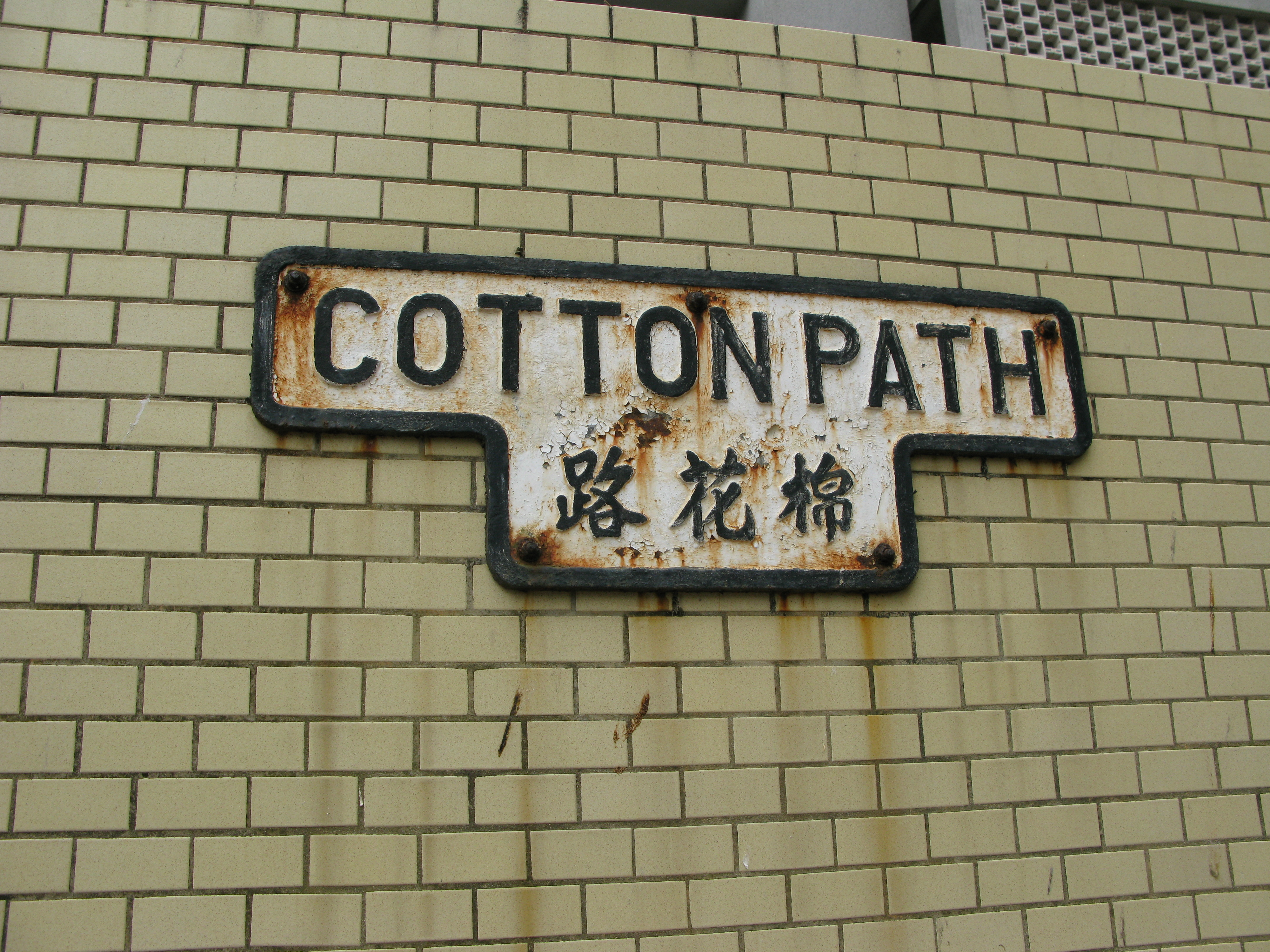 中文（香港）: 香港銅鑼灣棉花路路牌，近加路連山道。